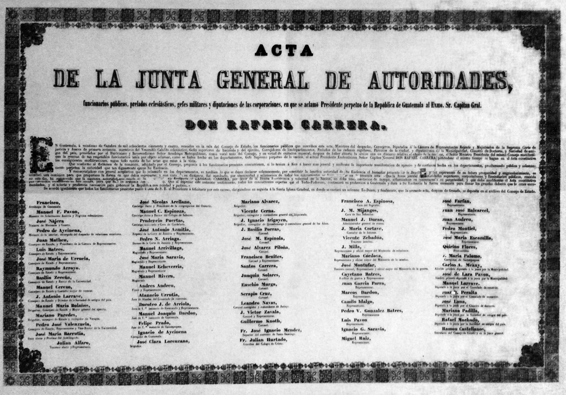 Declaración del presidente Presidente Rafael Carrera como vitalicio. Más de las mitad de los firmantes formaban parte del Clan Aycinena.